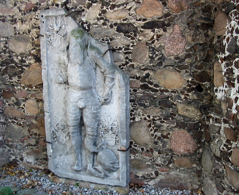 płyta nagrobna z przykościelnego cmentarza. Obecnie wmurowana w ścianę XIII-wiecznego kościoła. Ochla, woj. lubuskie.